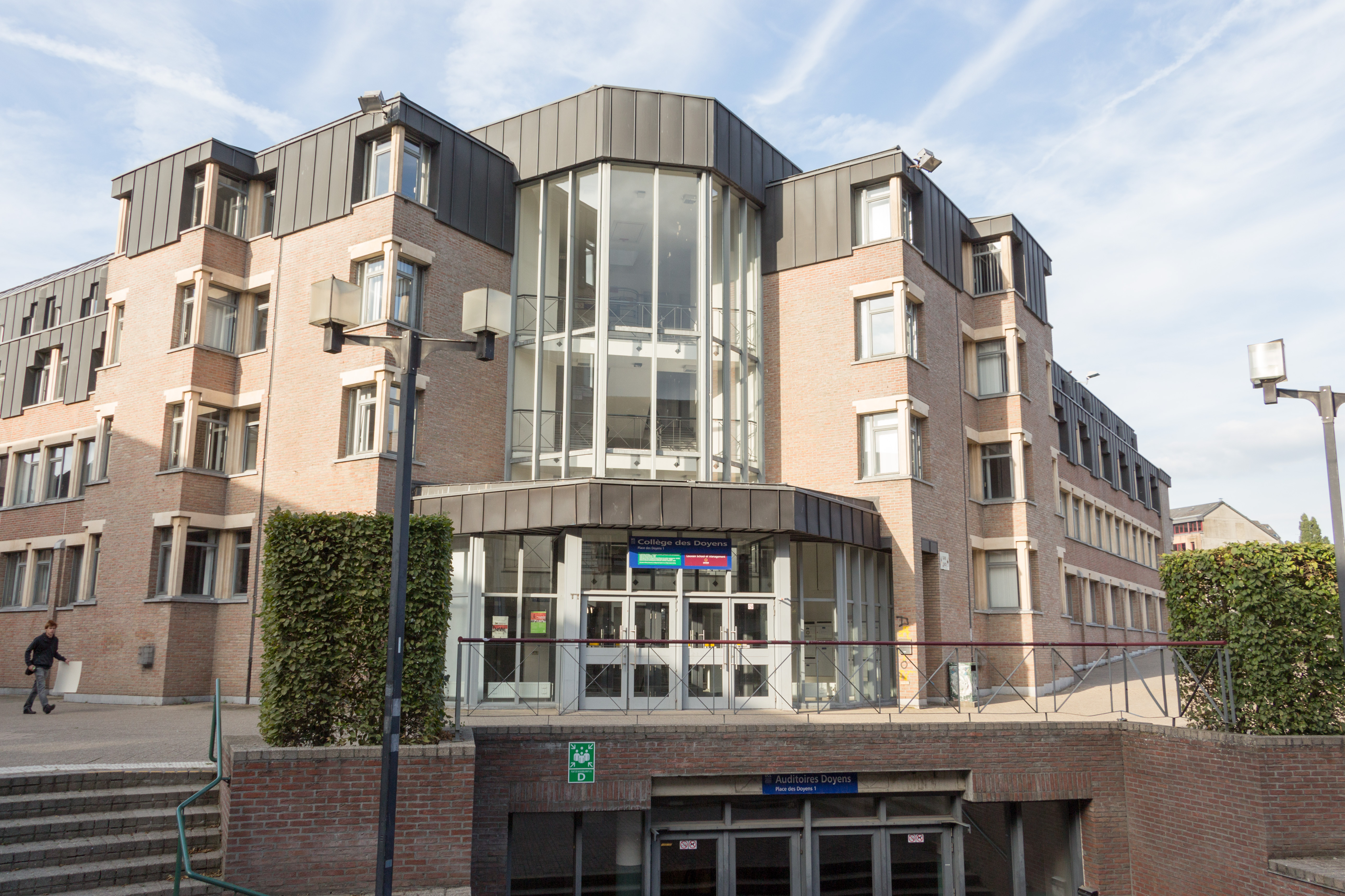 Vue du Collège des Doyens, siège de la Louvain School of Management (UCL), à Louvain-la-Neuve.